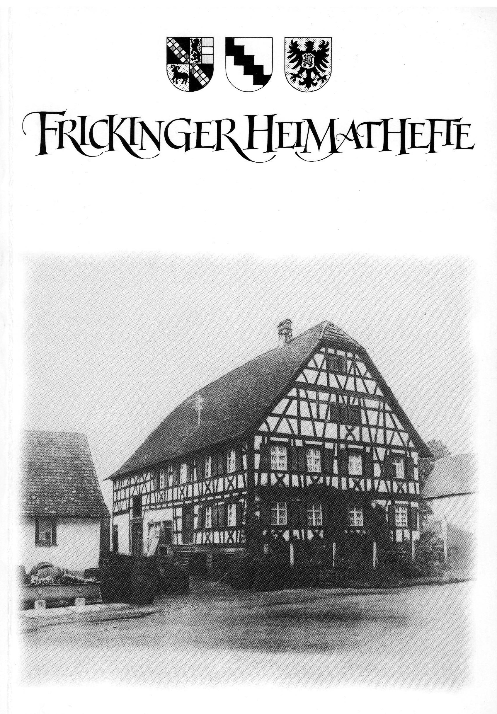 Frickinger Heimatheft Nr. 5, 1996, herausgegeben vom Heimatverein Frickingen - Oberes Aachtal e. V.